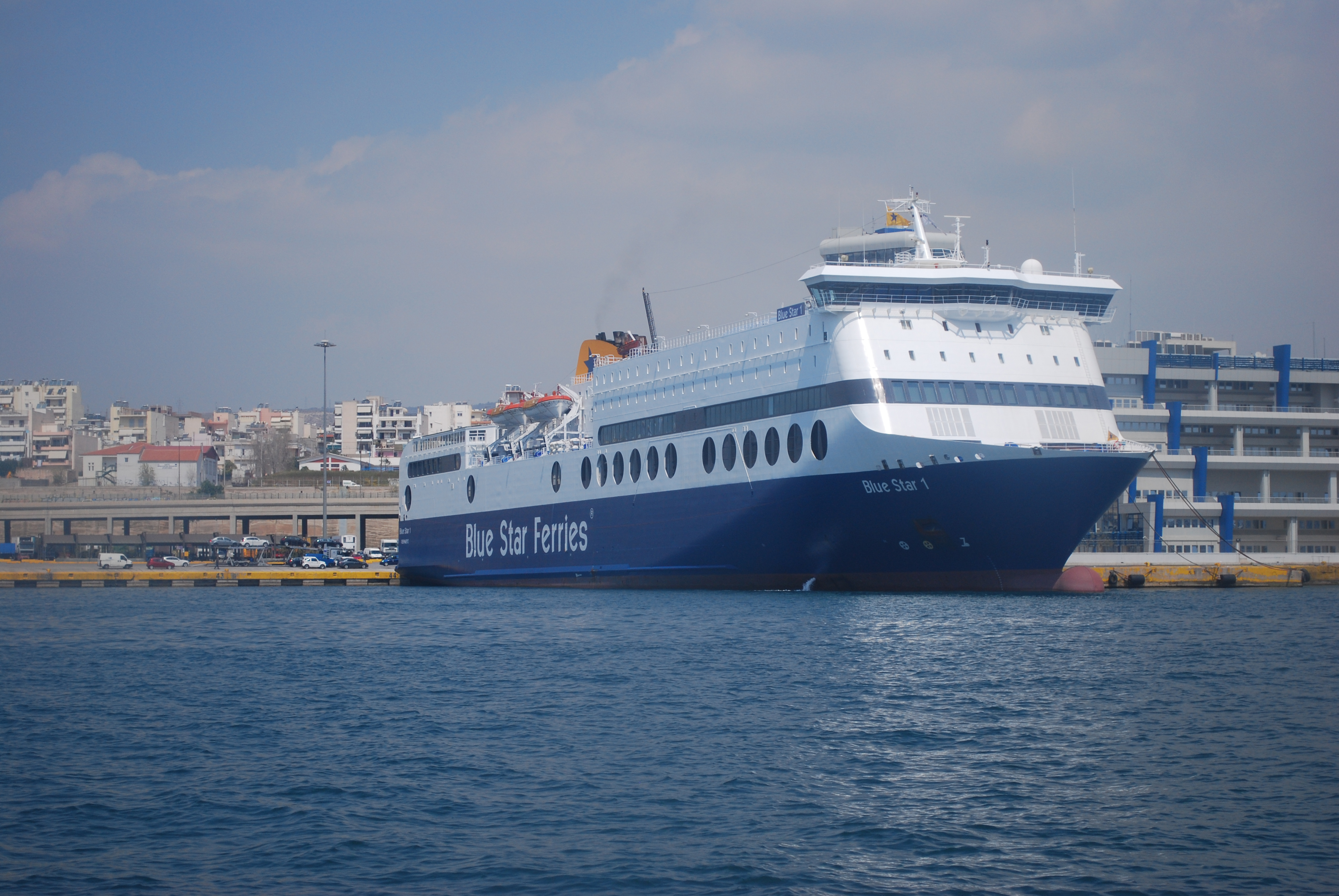 Vue du port du Pirée.